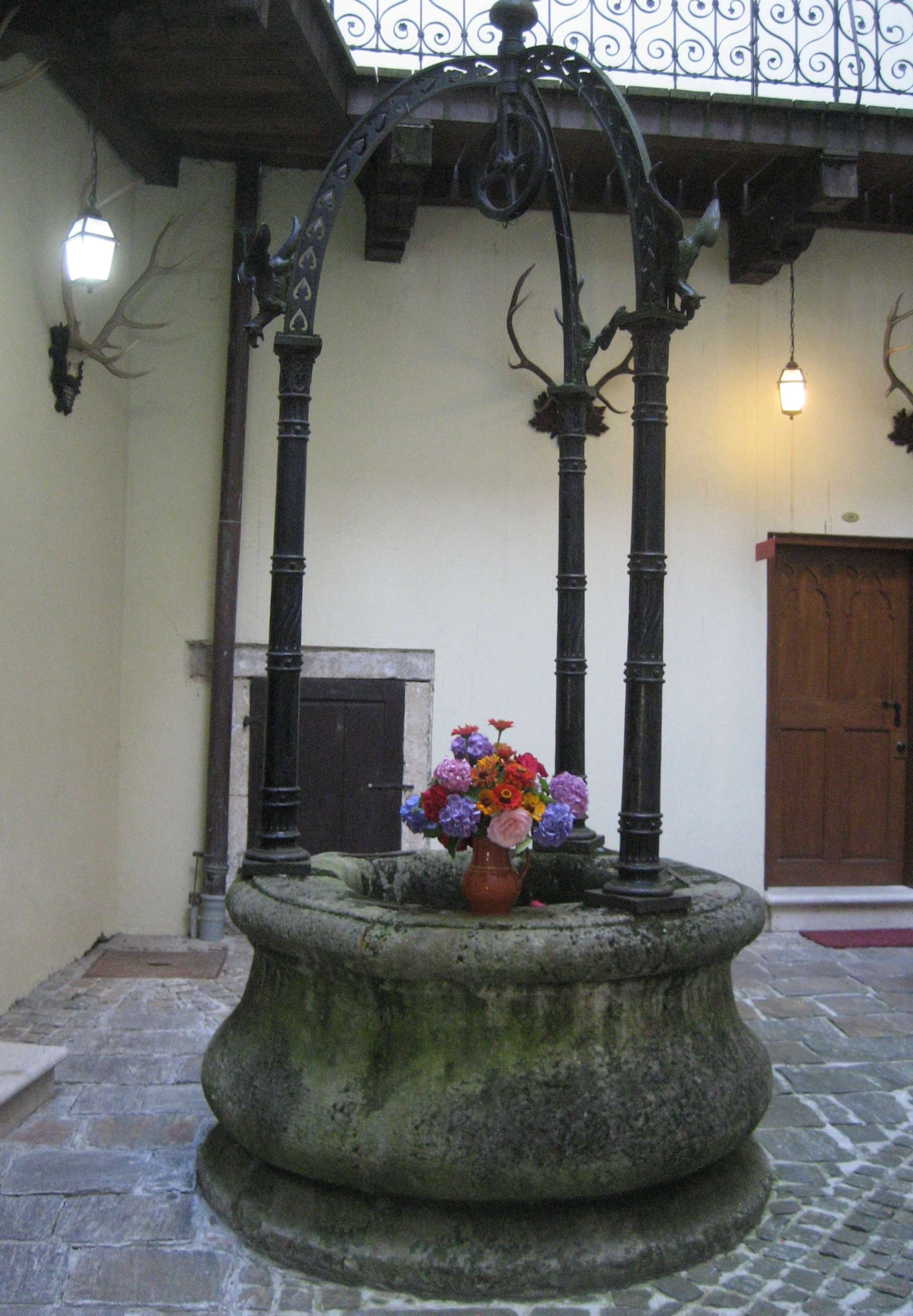 Ziehbrunnen, Schloss Trakoscan, Kroatien